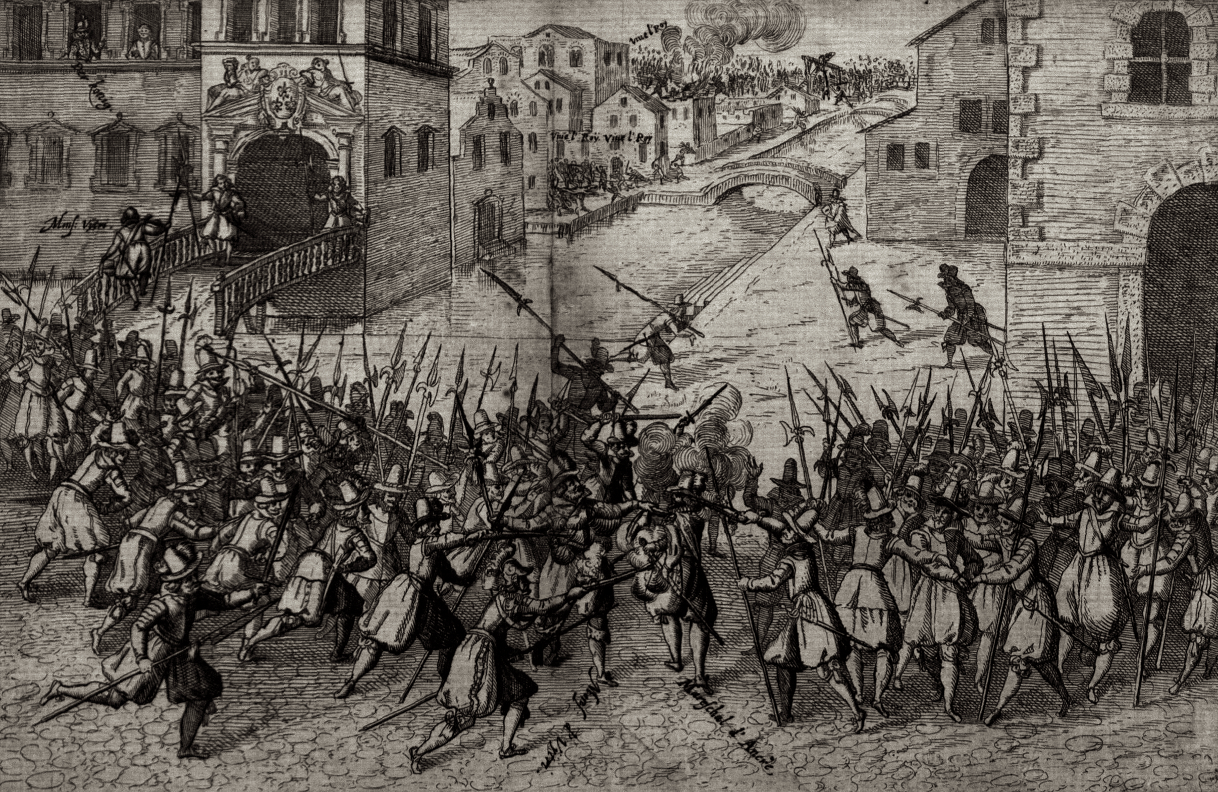 Illustration aus: Bericht//Wie das auß Kön. Mayestat in Franckreich befelch/der// Mareschal d’Ancre, vom Leben abgestrafft…, Radierung, 1617